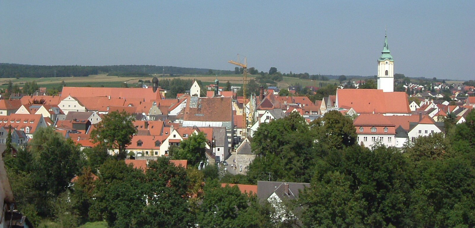 Abensberg - Historische Altstadt, September 2004 Public Domain, eigene Aufnahme Möglichkeiten zur Lizenzierung, bitte die nicht-benötigte Variante aus dem Code löschen